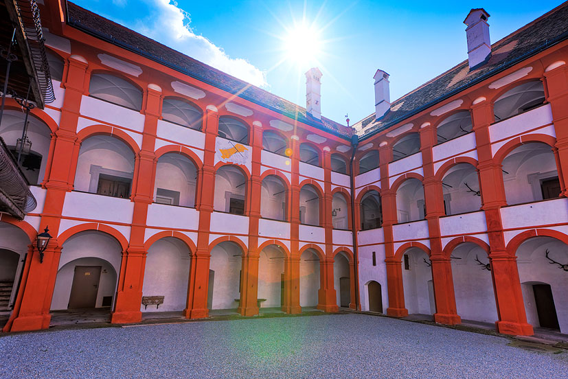 Arkadenhof des Schlosses Pernegg in der Steiermark